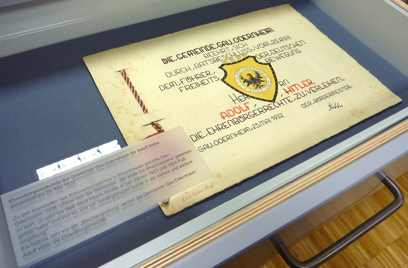 Ehrenbürgerurkunde der Gemeinde Gau-Odernheim für Adolf Hitler, ausgestellt am 15. Mai 1932. Heute im Museum der Stadt Alzey.